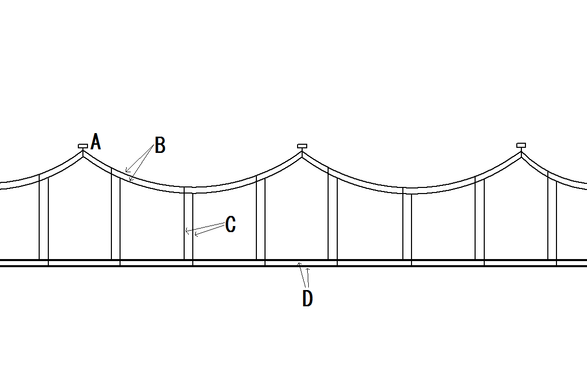 ツイン・シンプル・カテナリ式の架線。A吊架線の支持点の碍子等、B吊架線、Cハンガー線、Dトロリー線。